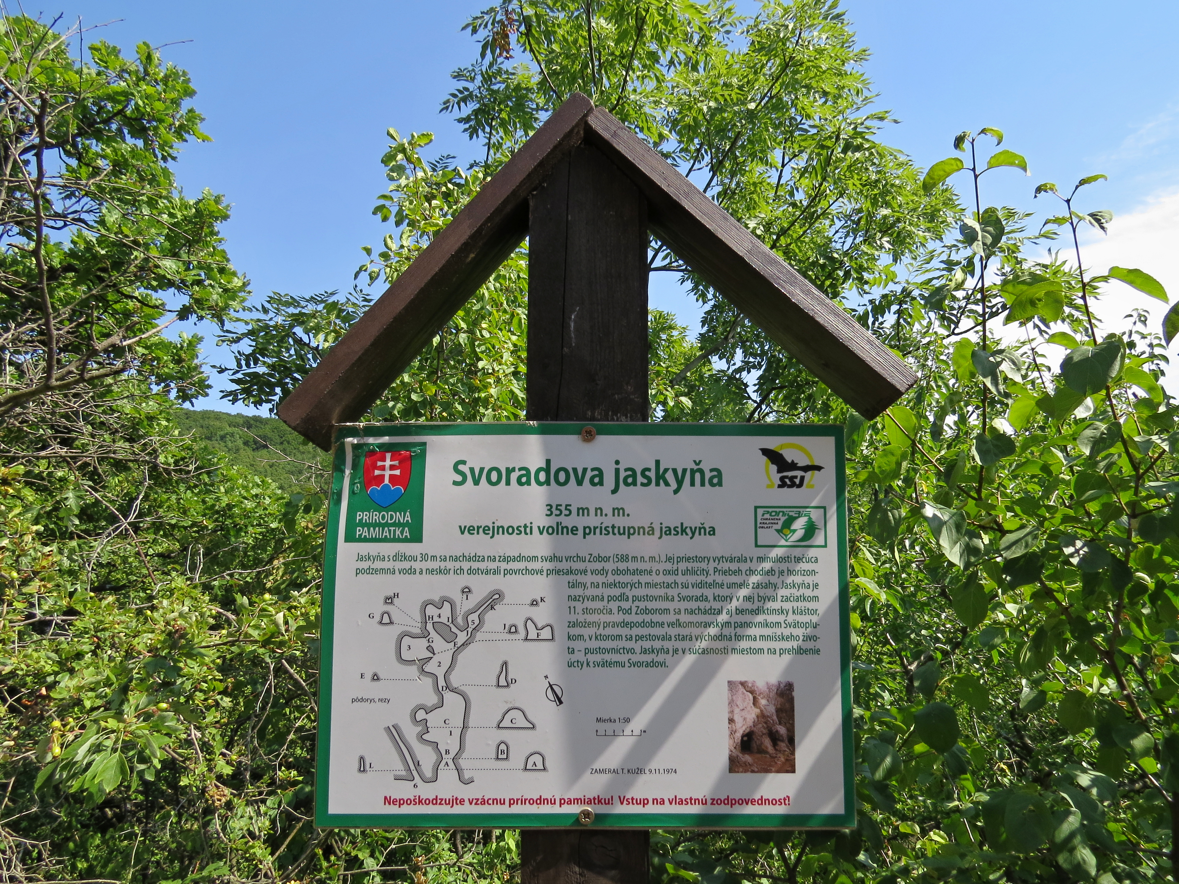 Infotabule u Svoradovy jeskyně